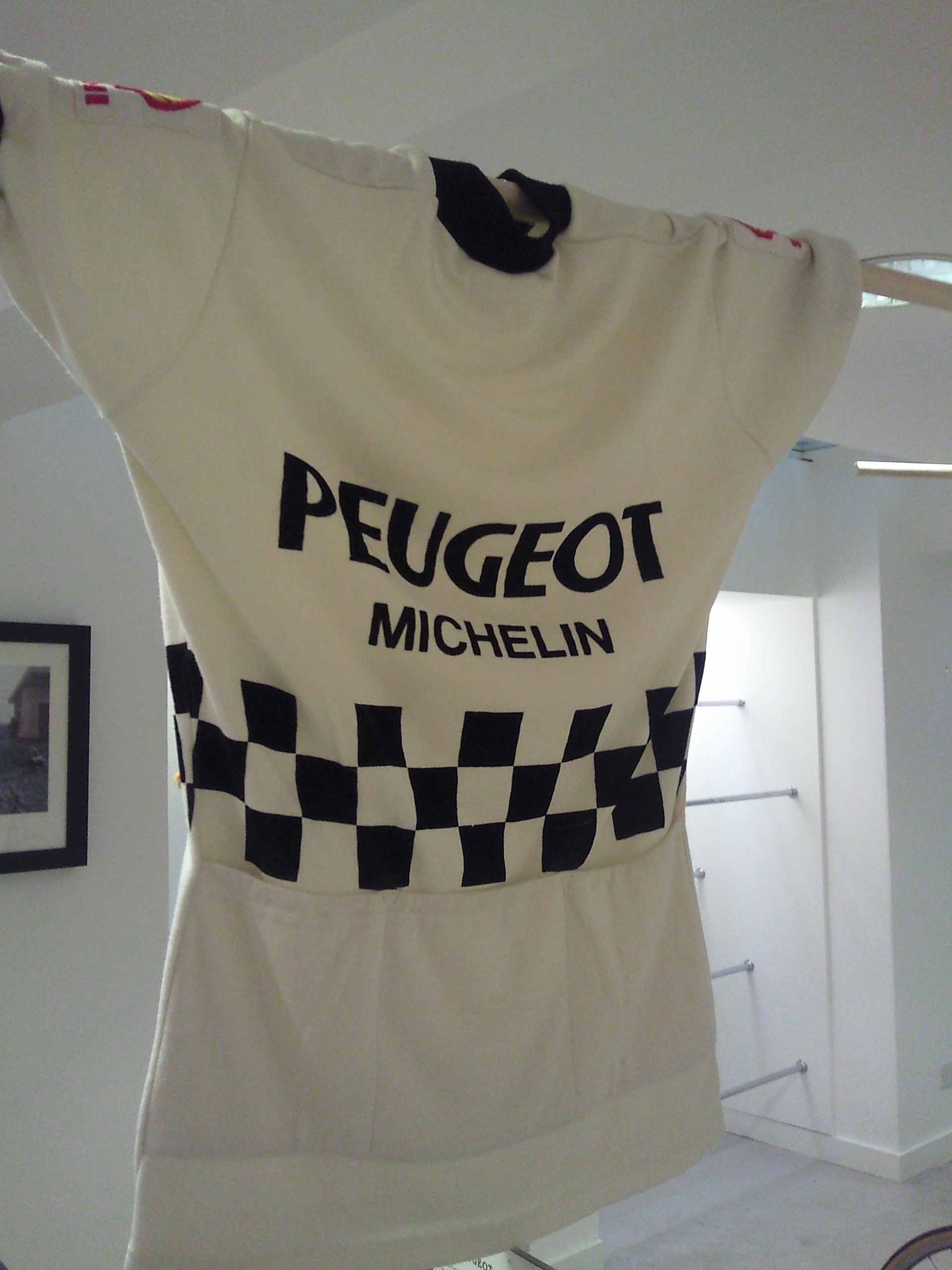 Peugeot jersey